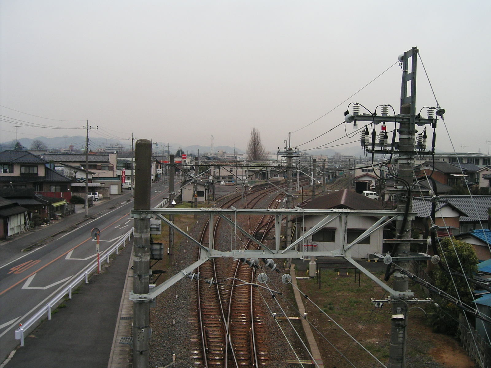 Sanoshi Station in Tobu Sano Line,Tochigi pref,Japan 東武佐野線佐野市駅